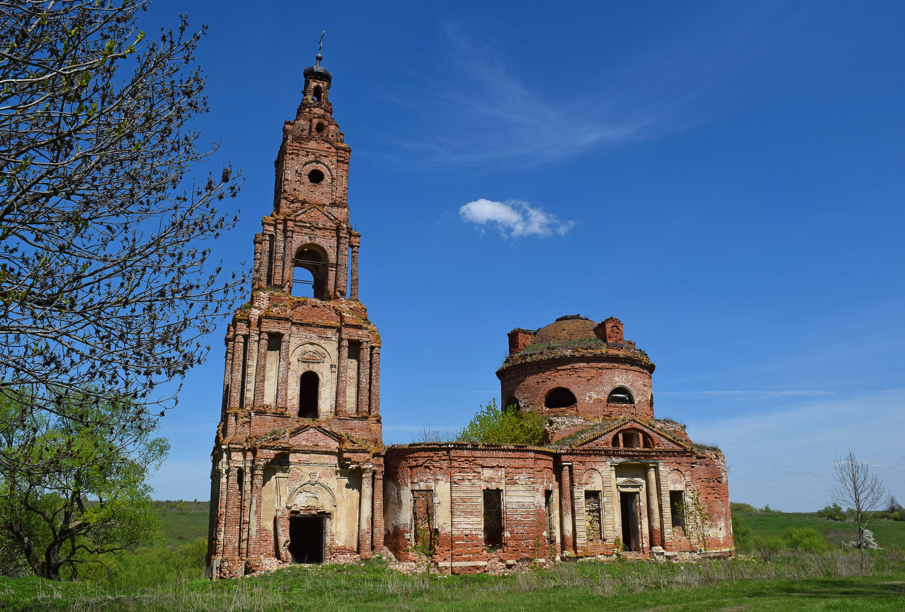 Фёдоровская церковь села Старое Курбатово, Милославский район, Рязанская область